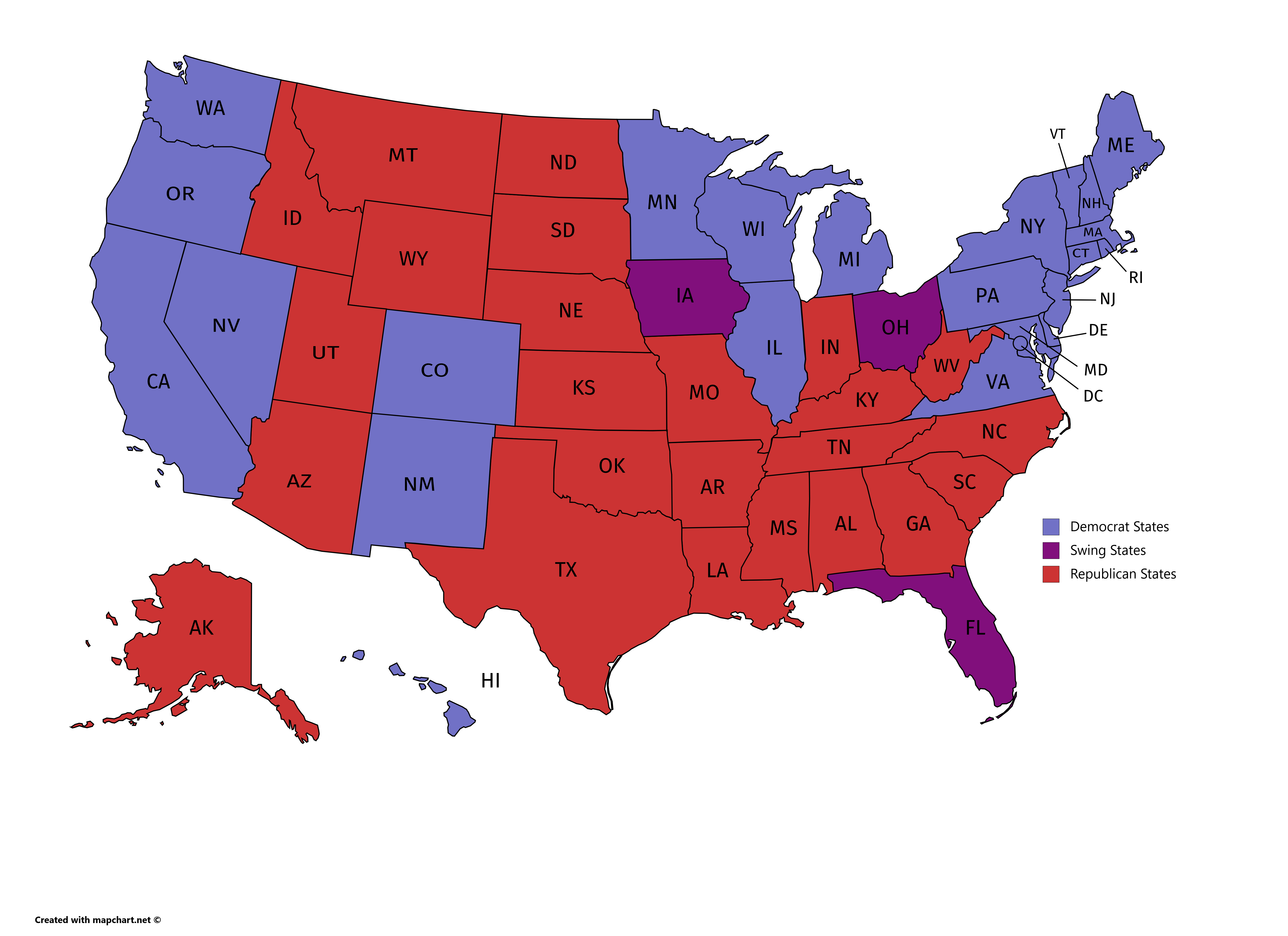 Carte sur le "thème" élections aux us